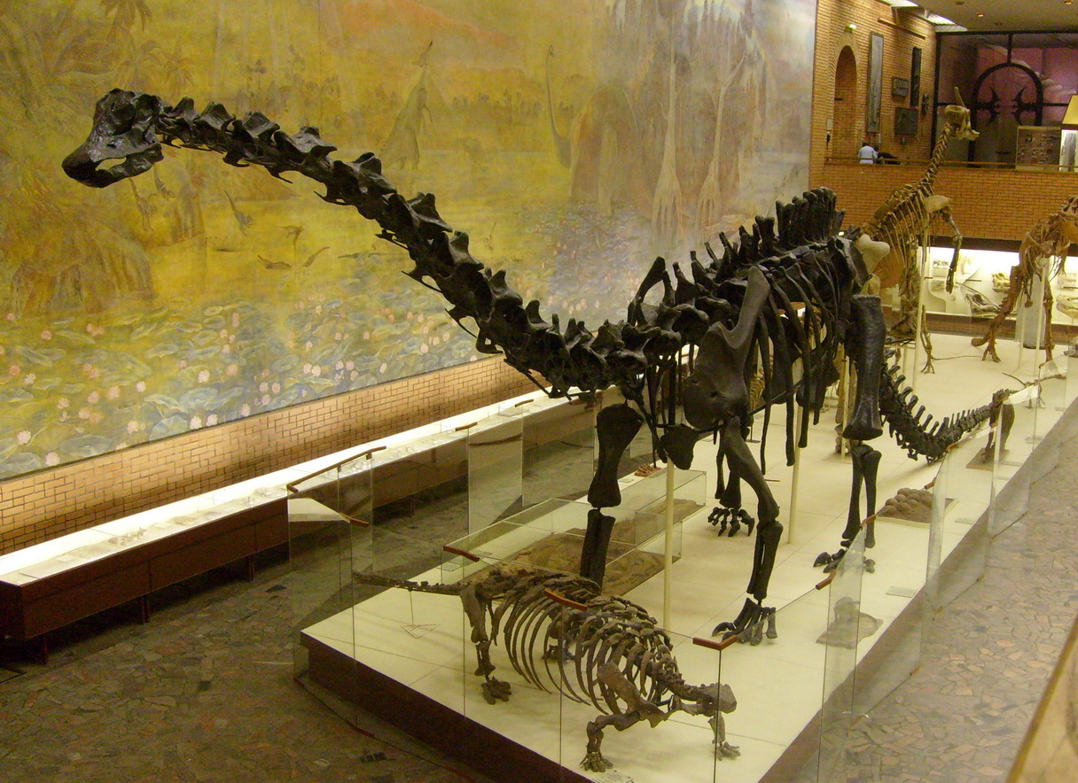 Скелет диплодока в Палеонтологическом музее им. Ю. А. Орлова